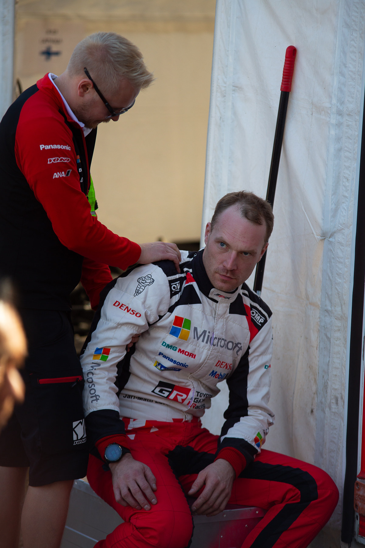 Rajd Hiszpanii 2019 - Latvala Jari-Matti